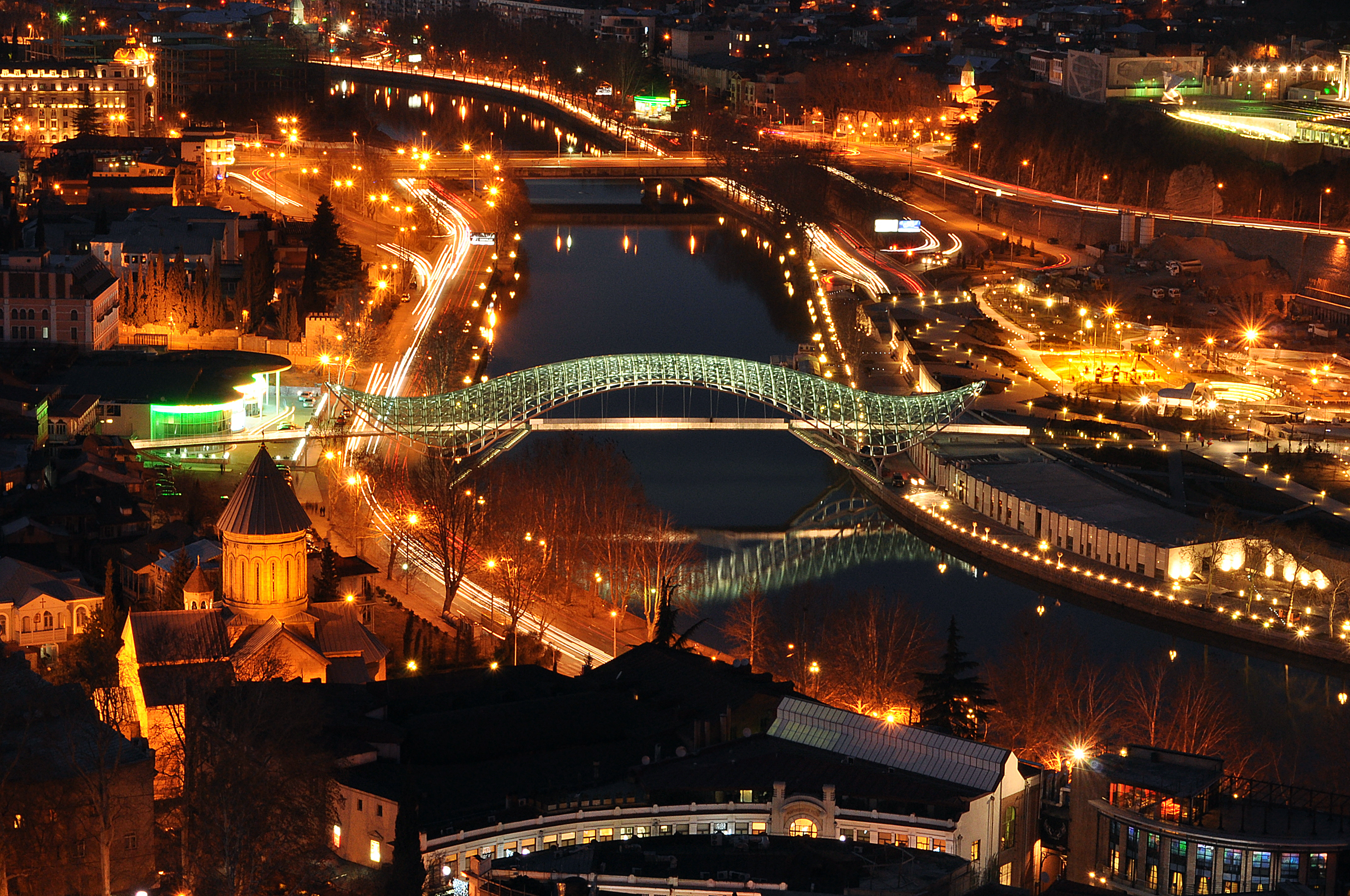 Mtkvari